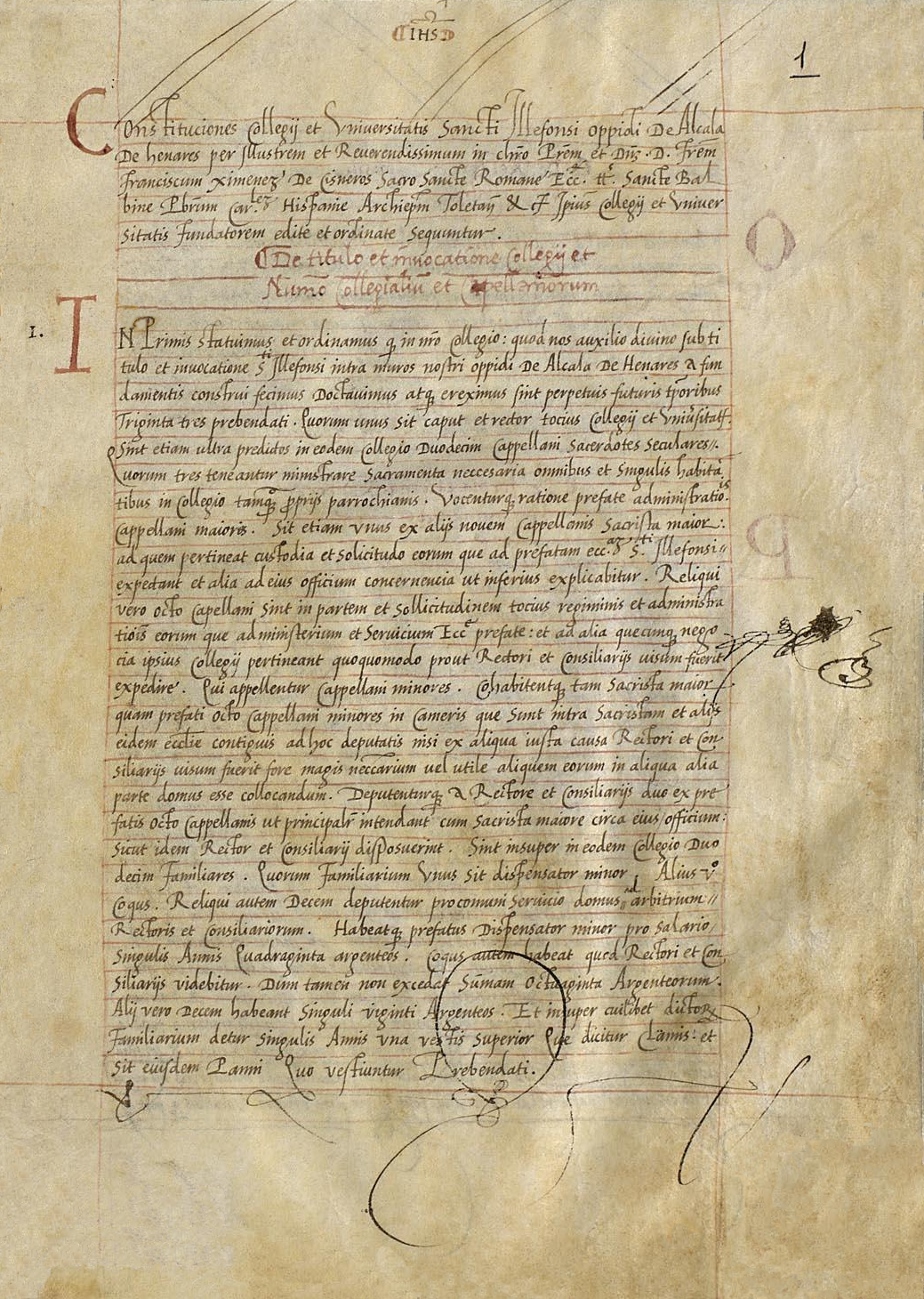 Primeras constituciones latinas originales del Colegio Mayor de San Ildefonso de la Universidad de Alcalá. Firmadas por el Cardenal Cisneros en Alcalá de Henares, el 22 de enero de 1510. Manuscrito en pergamino.